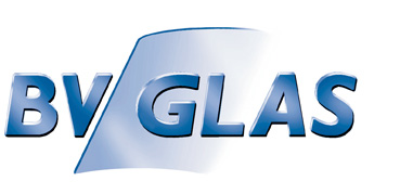 Offizielles Logo des Bundesverband Glasindustrie e.V.